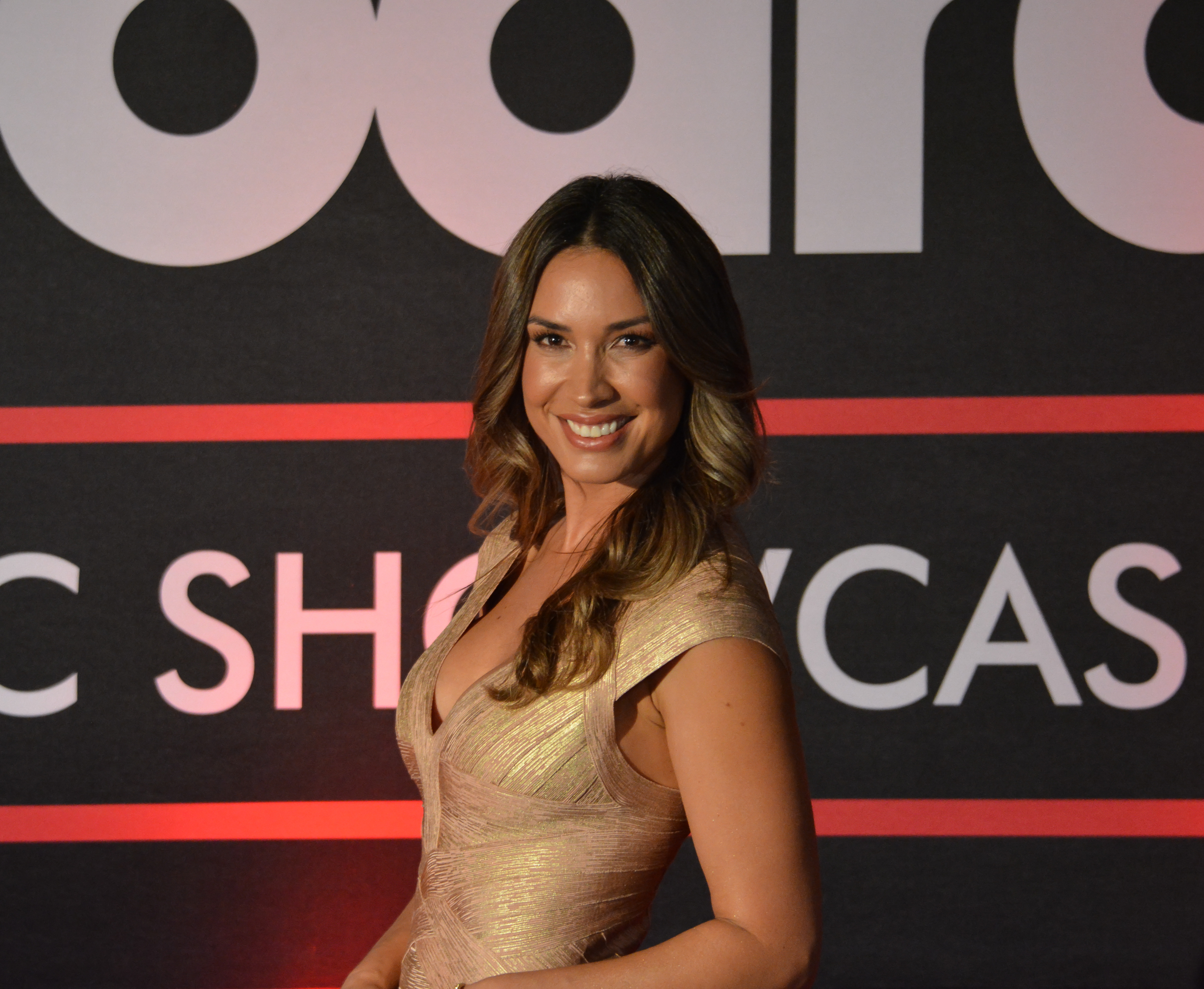 Gala Billboard Latin Music Showcase Chile 2018, Hotel Santiago, Santiago, Chile